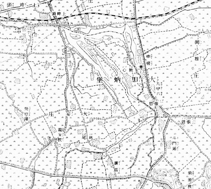 臺北市大安區1898年臺灣堡圖